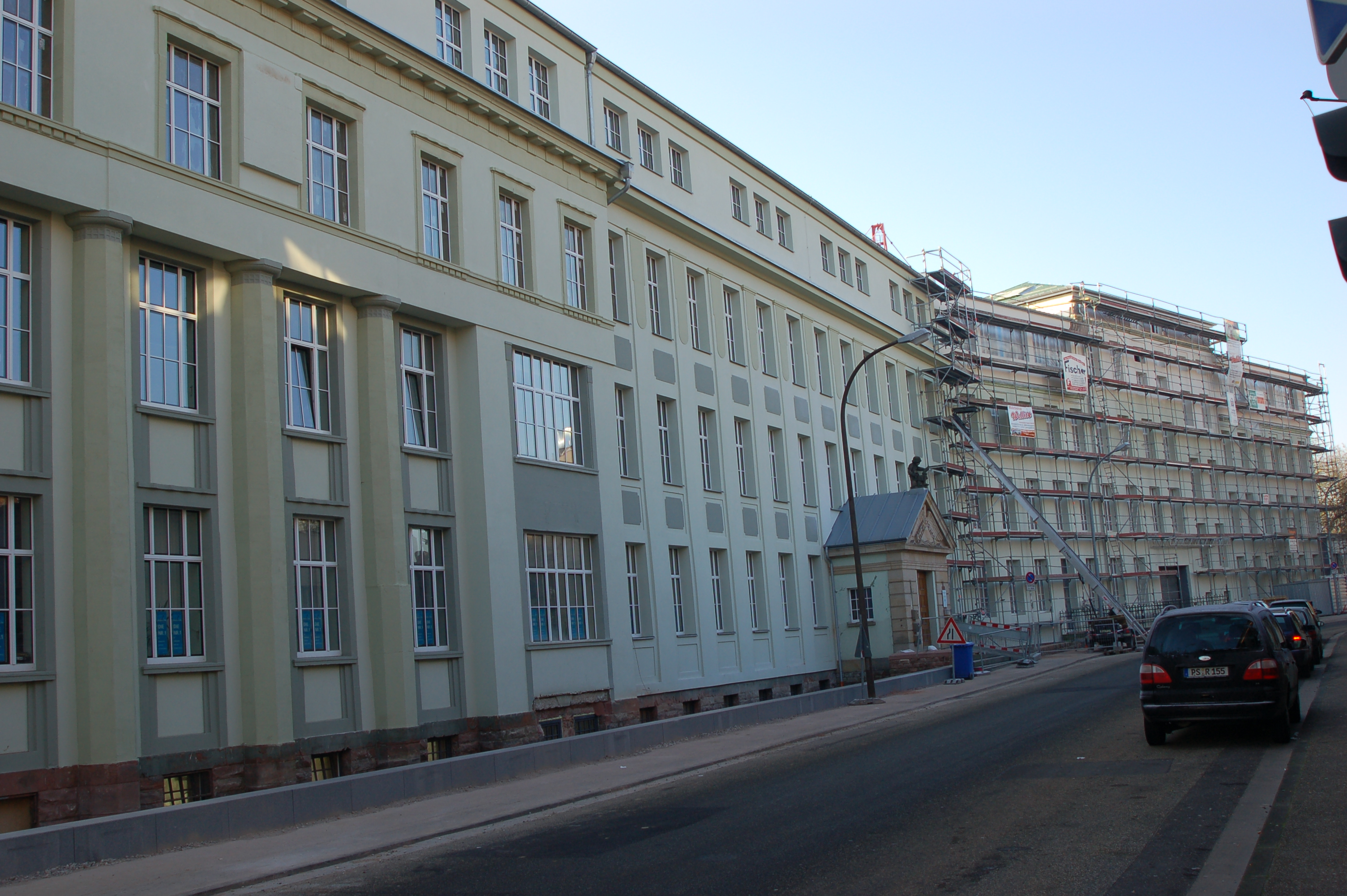 Fassade des Rheinberger-Gebäudes (Emil-Kömmerling-Strasse); links fertig renoviert, rechts noch im Bau